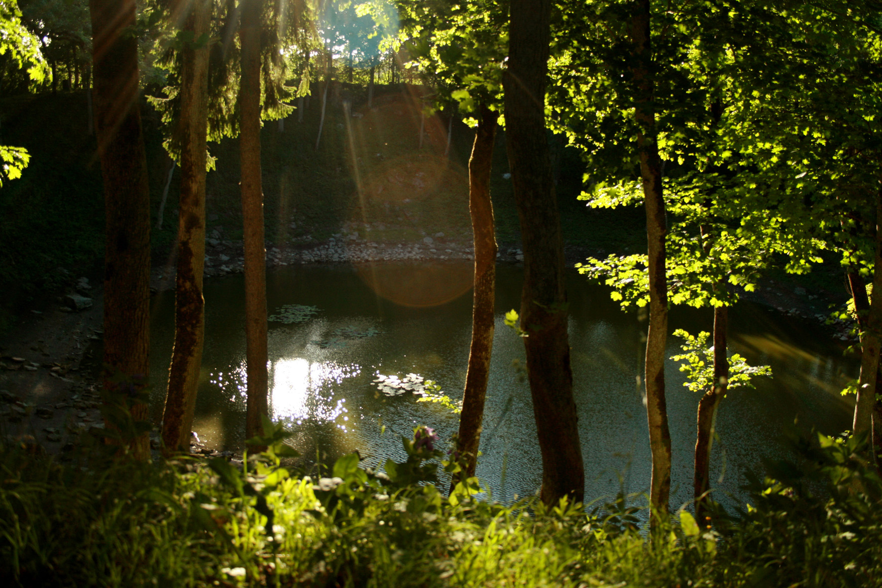 Kaali pühapaik Kõljala külas Saaremaal. Kuvavõistluse "Maavalla hiied 10226" (2013) saarte eriauhind.